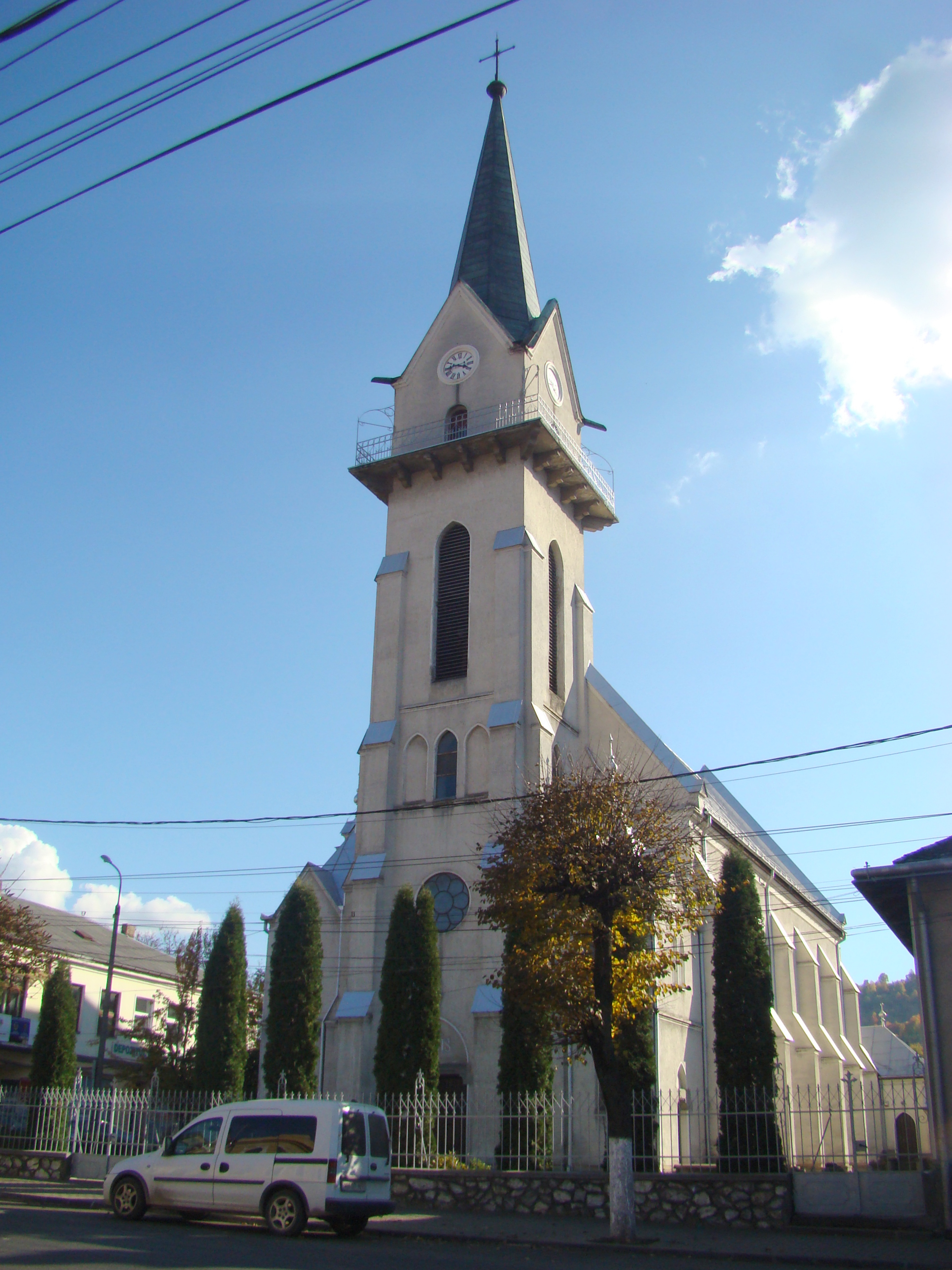 Biserica romano-catolică "Ioan și Ana", oraș Vișeu de Sus